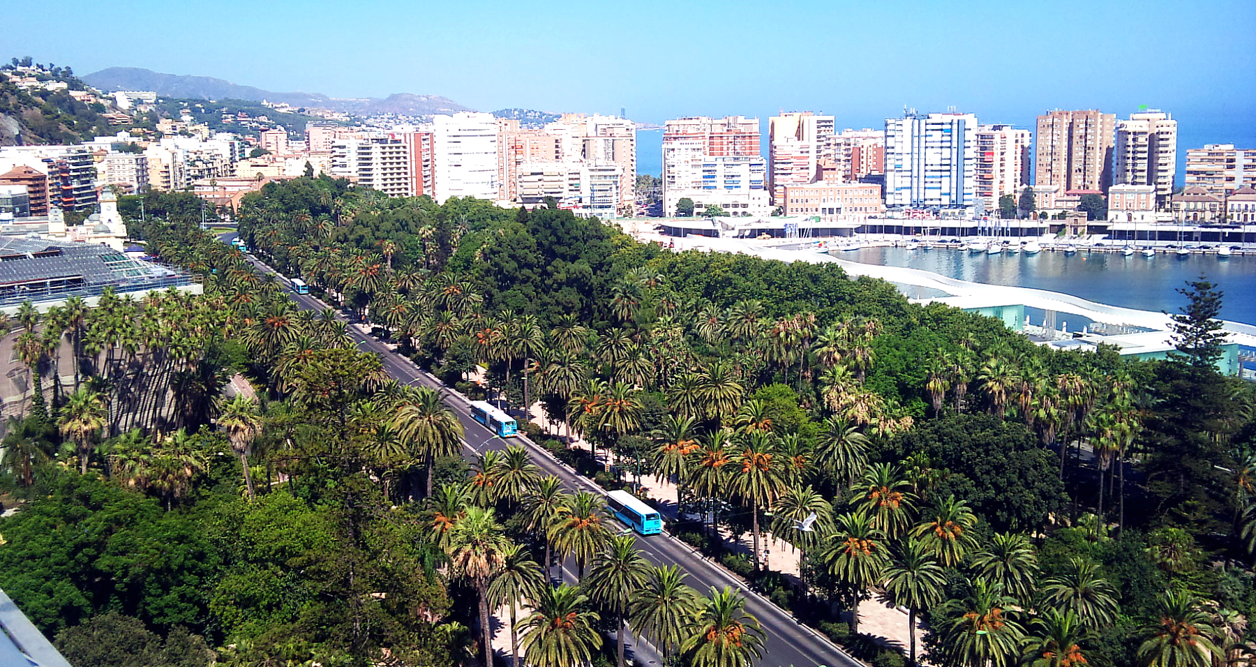 Vista del Parque de Málaga desde el hotel Málaga Palacio